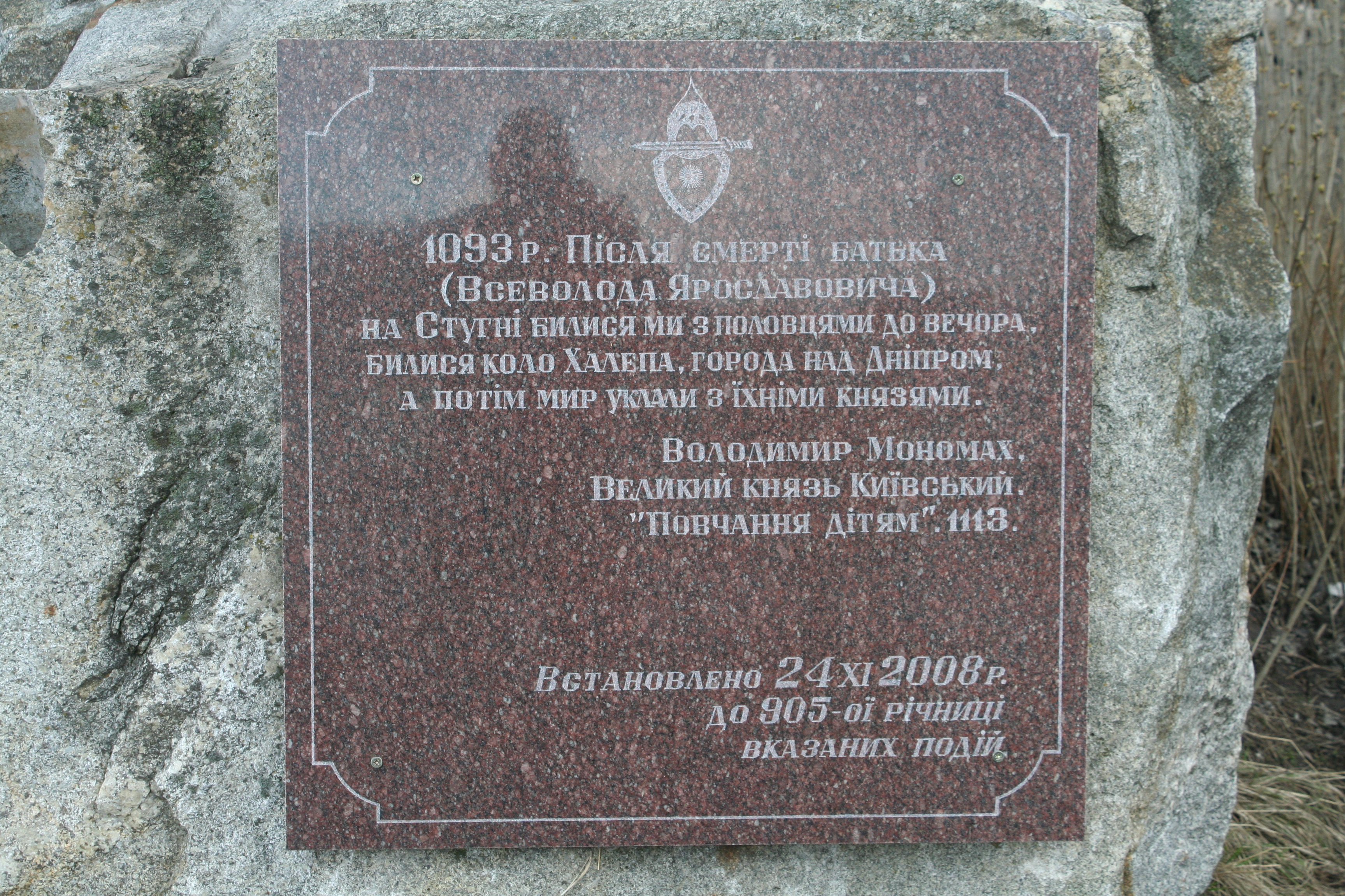 Обухівський р-он., с. Халеп'я, памятний камінь на честь 905-ї річниці битви з половцями у міста Халепа, мемореальна дошка